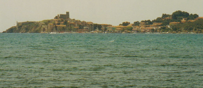 Panorama dal mare con Rocca aldobrandesca Talamone (GR), foto da apparecchio non digitale del 20/04/2002.